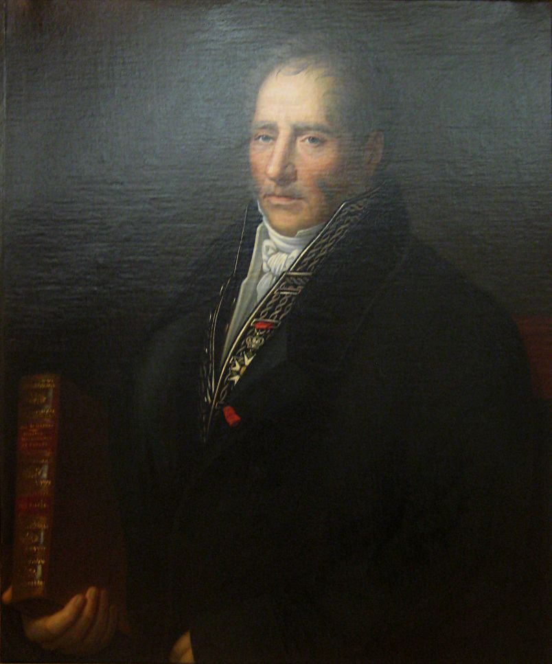 Portrait d'Antoine Blatin, maire de Clermont-Ferrand